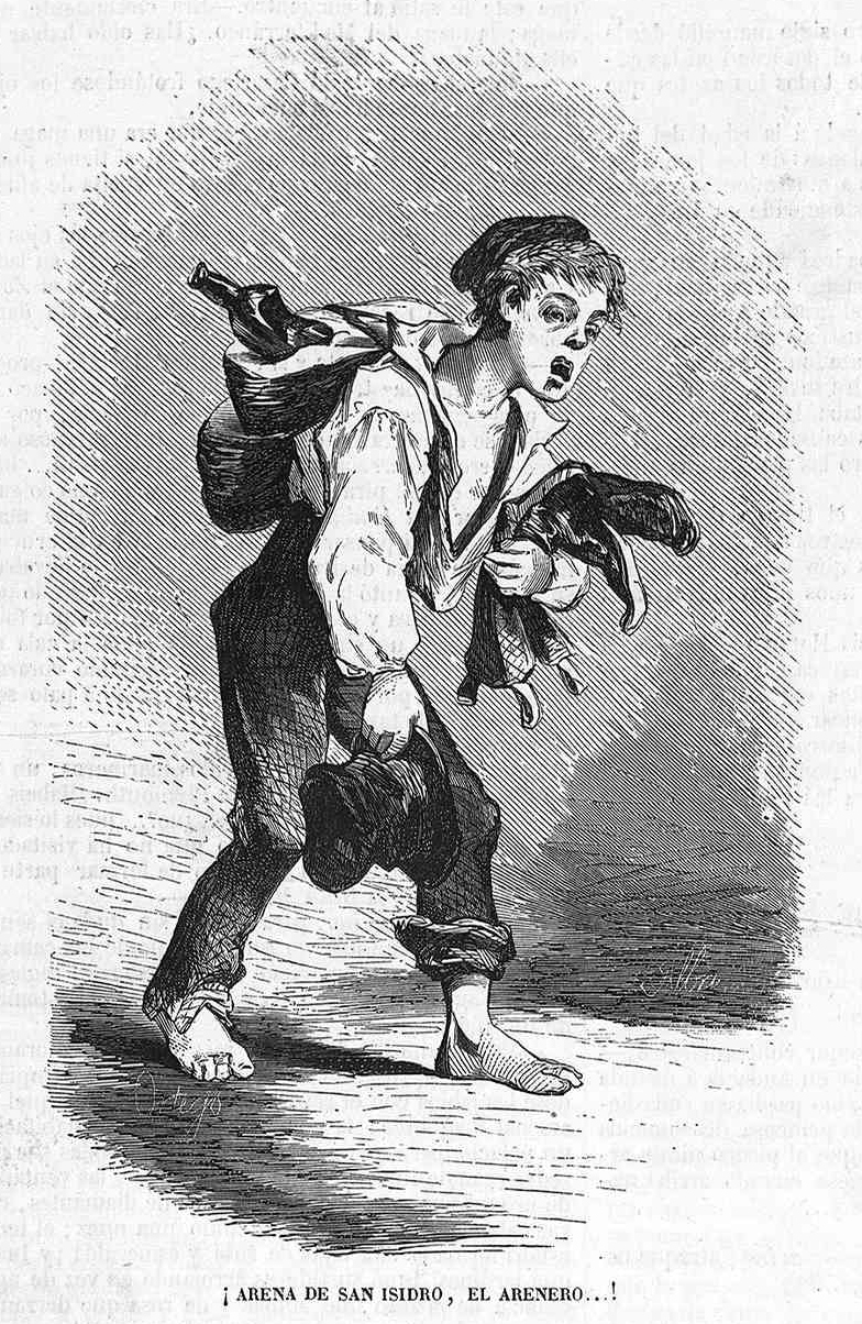 Comercio ambulante de Madrid. Industria ambulante de Madrid.